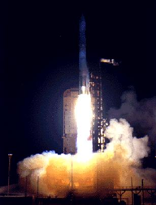 Mariner 10 - lift-off - NASA